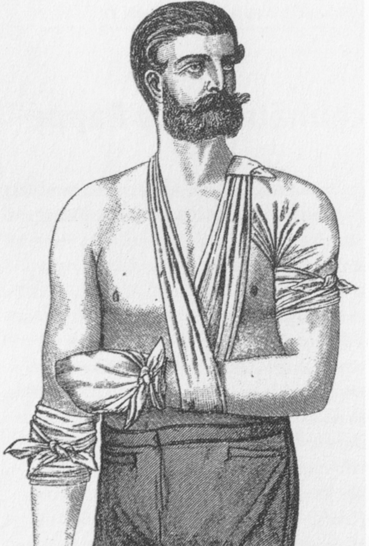 Das Esmarchsche "Erste-Hilfe-Tuch, Abbildung um 1882